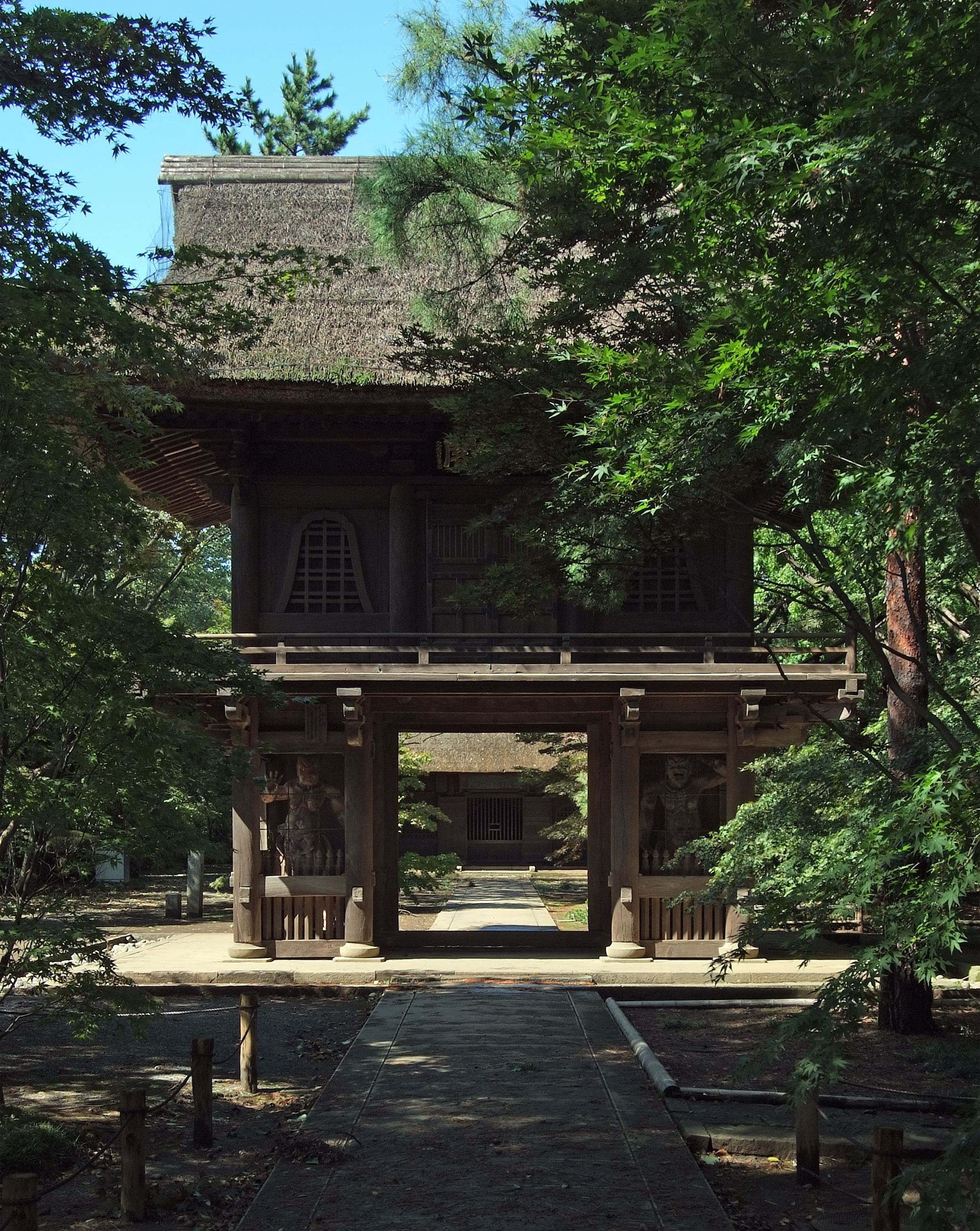 Heirin-ji Sanmon, at Niiza Saitama Japan, built in 1664.